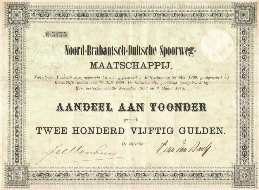 NBDS aandeel, Eigenes Foto der Urkunde im Eigenbesitz, Hans Schlieper,29. Mai 2006.